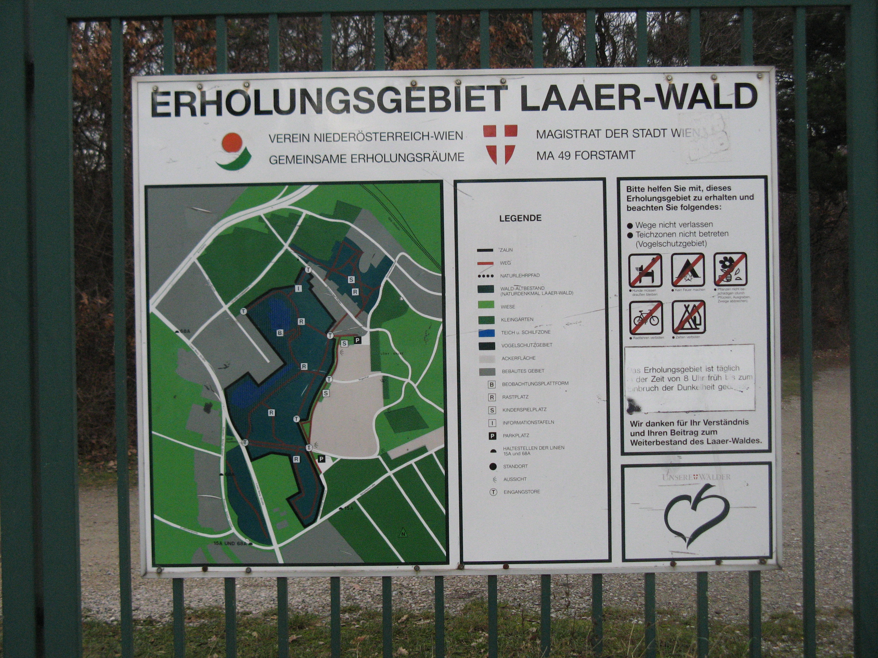 Zugang zum Erholungsgebiet Laaer Wald, Laaer-Berg-Straße, Wien-Favoriten